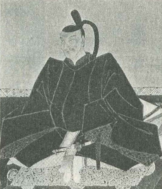 徳川光友の肖像。